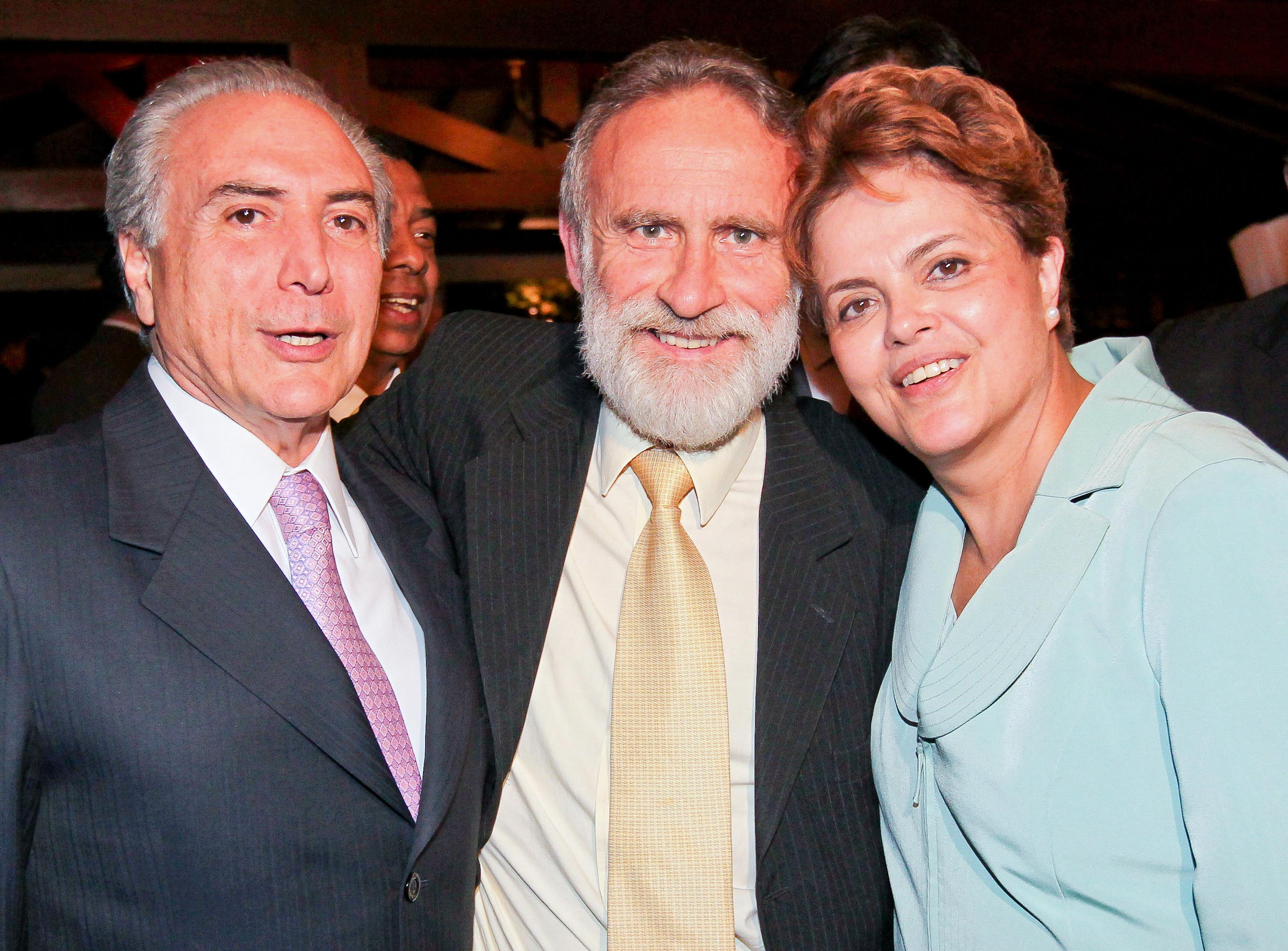 13/07/2010. Brasília - DF Foto: Roberto Stuckert Filho.